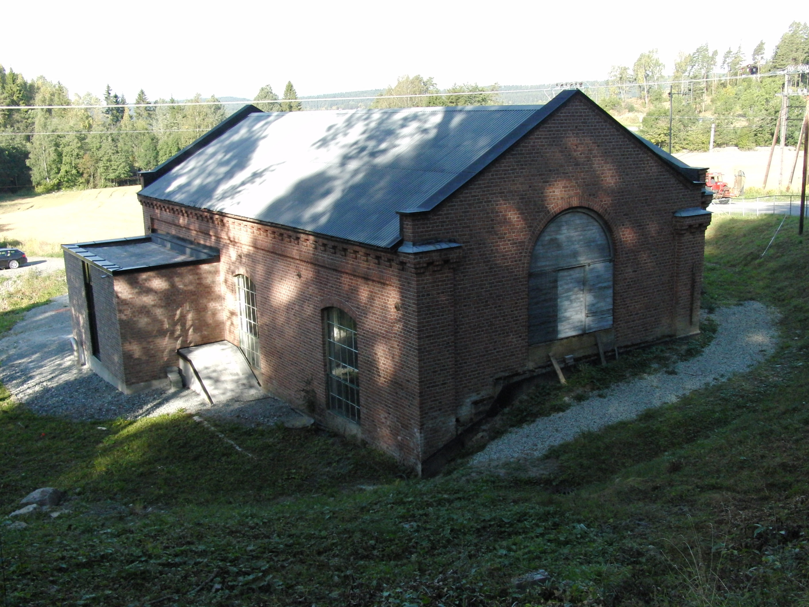 Åsa kraftverk